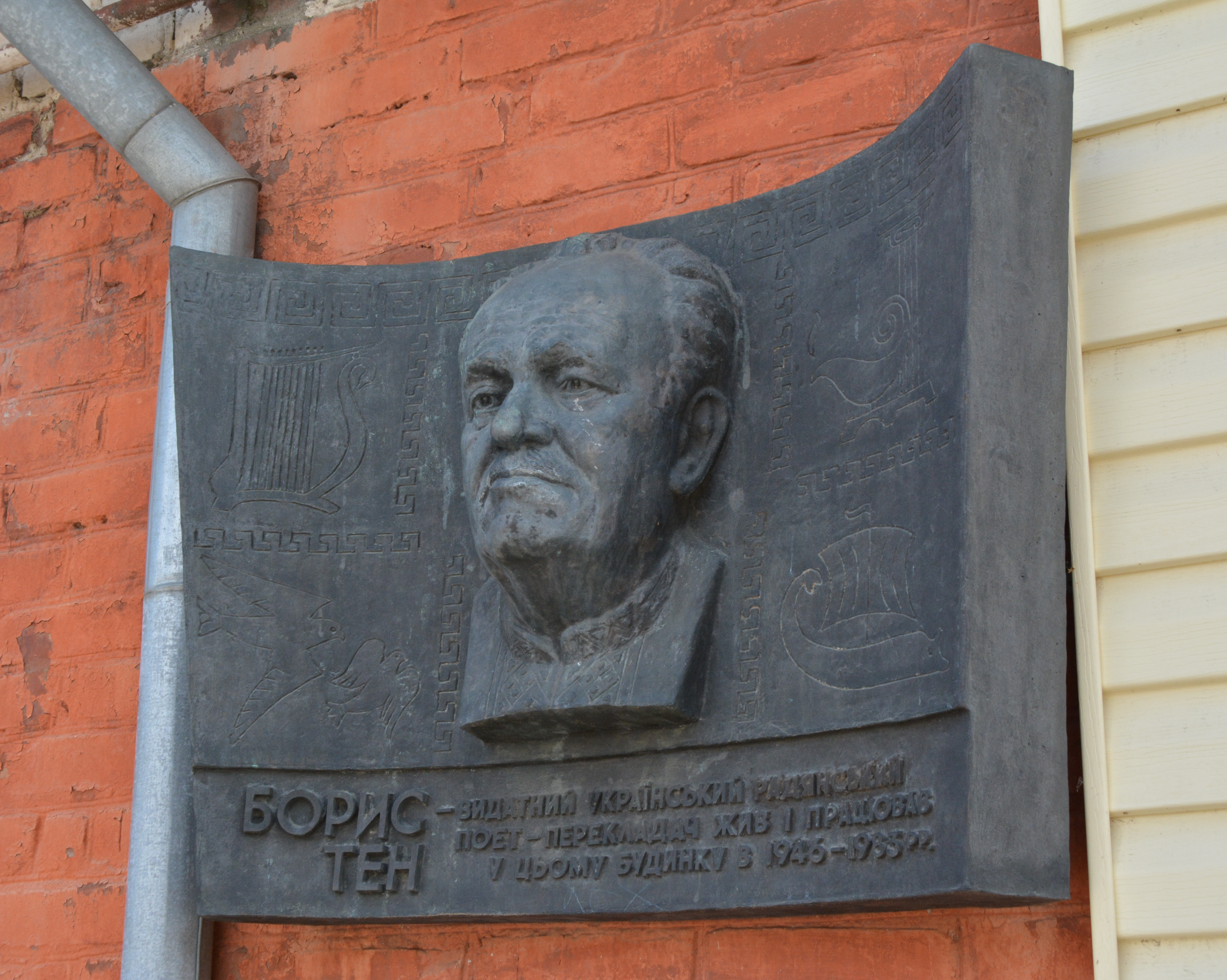 Будинок, де жив Борис Тен (М. В. Хомичевський), український поет й перекладач., Житомир, Вул. Бориса Тена, 36